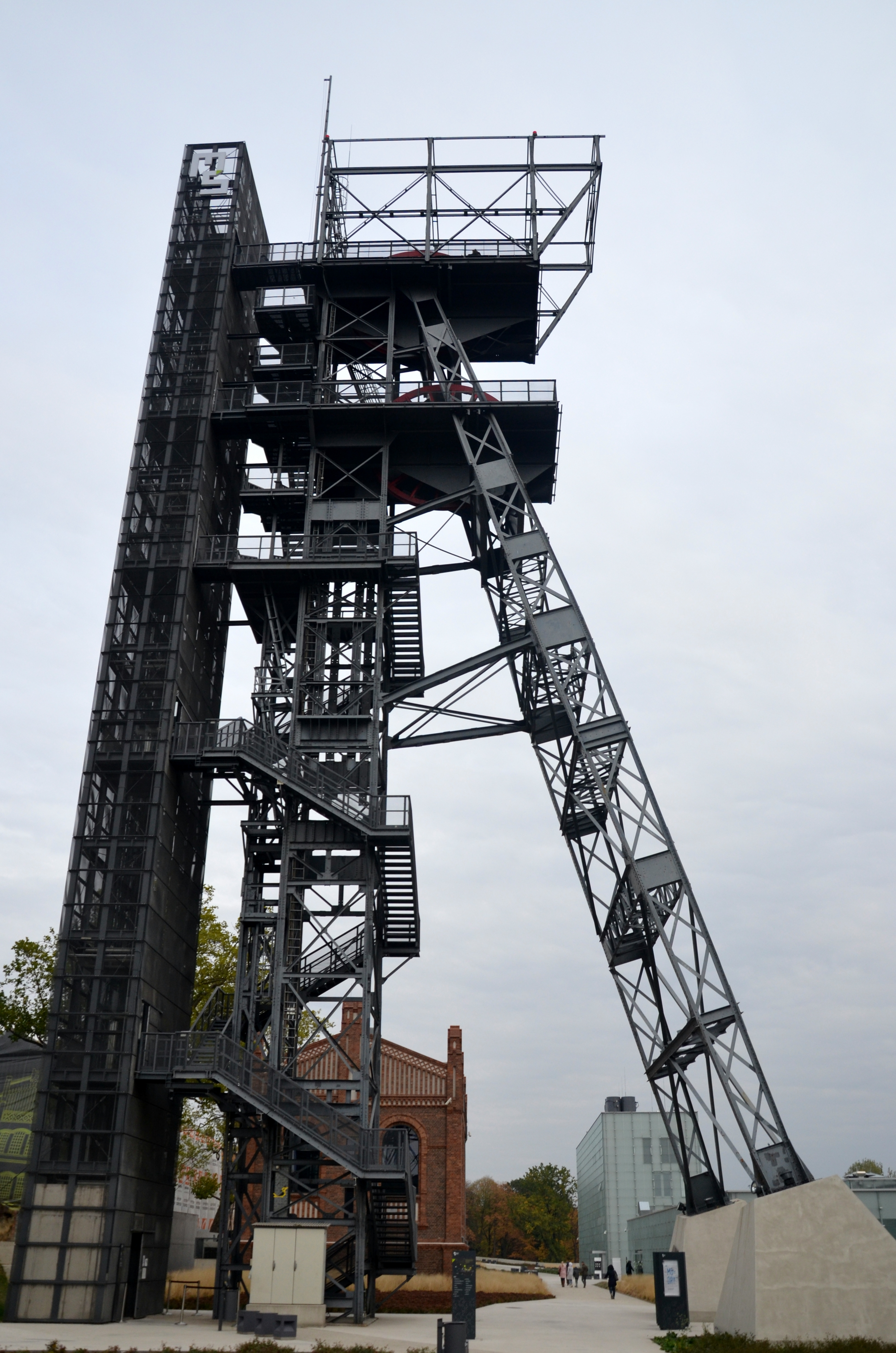 Schlesisches Museum (Katowice)